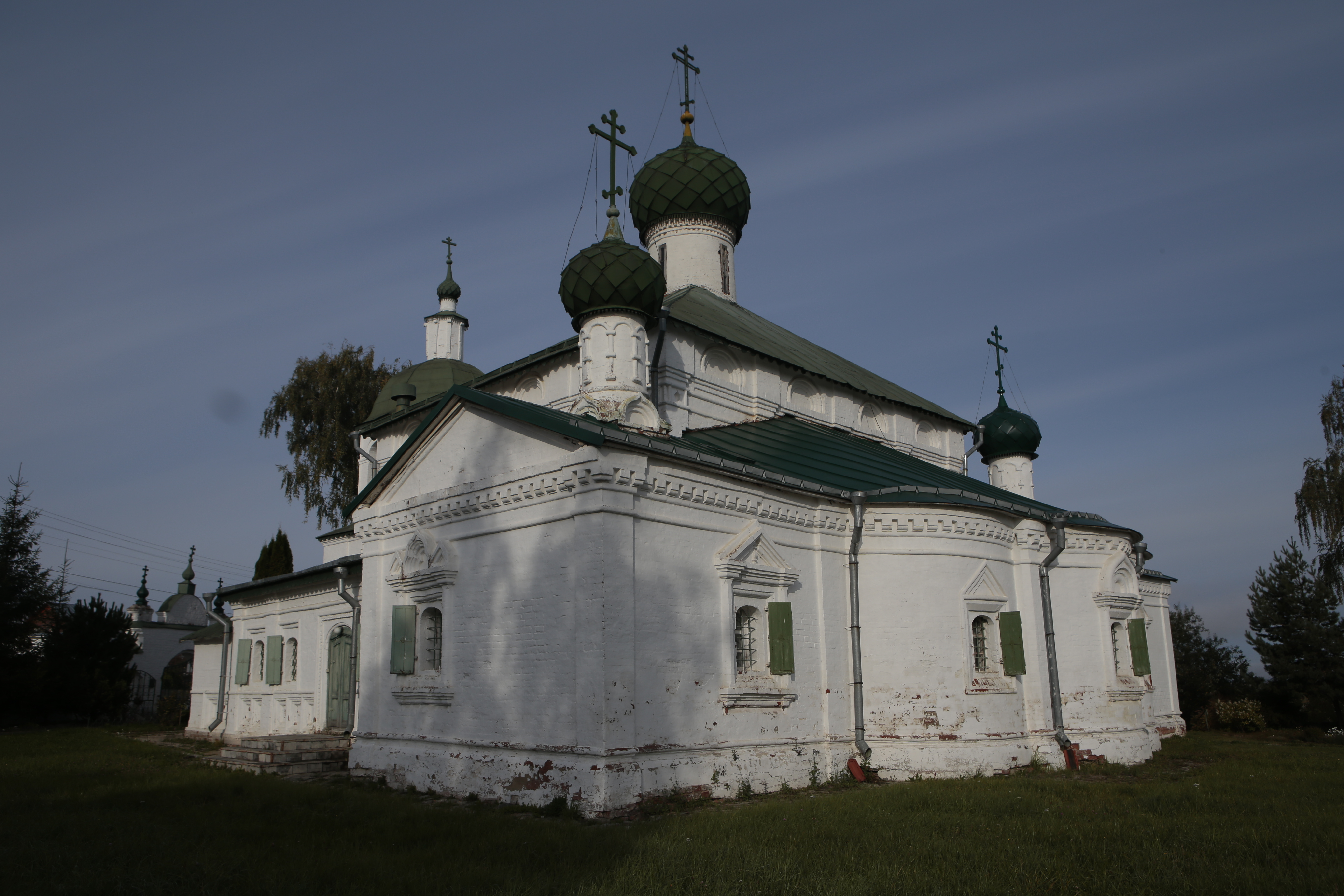 Церковь Рождества Христова на Городище (Кострома)